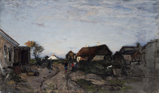 Fra Skagen Østerbytitle QS:P1476,sv:"Fra Skagen Østerby" label QS:Lsv,"Fra Skagen Østerby"